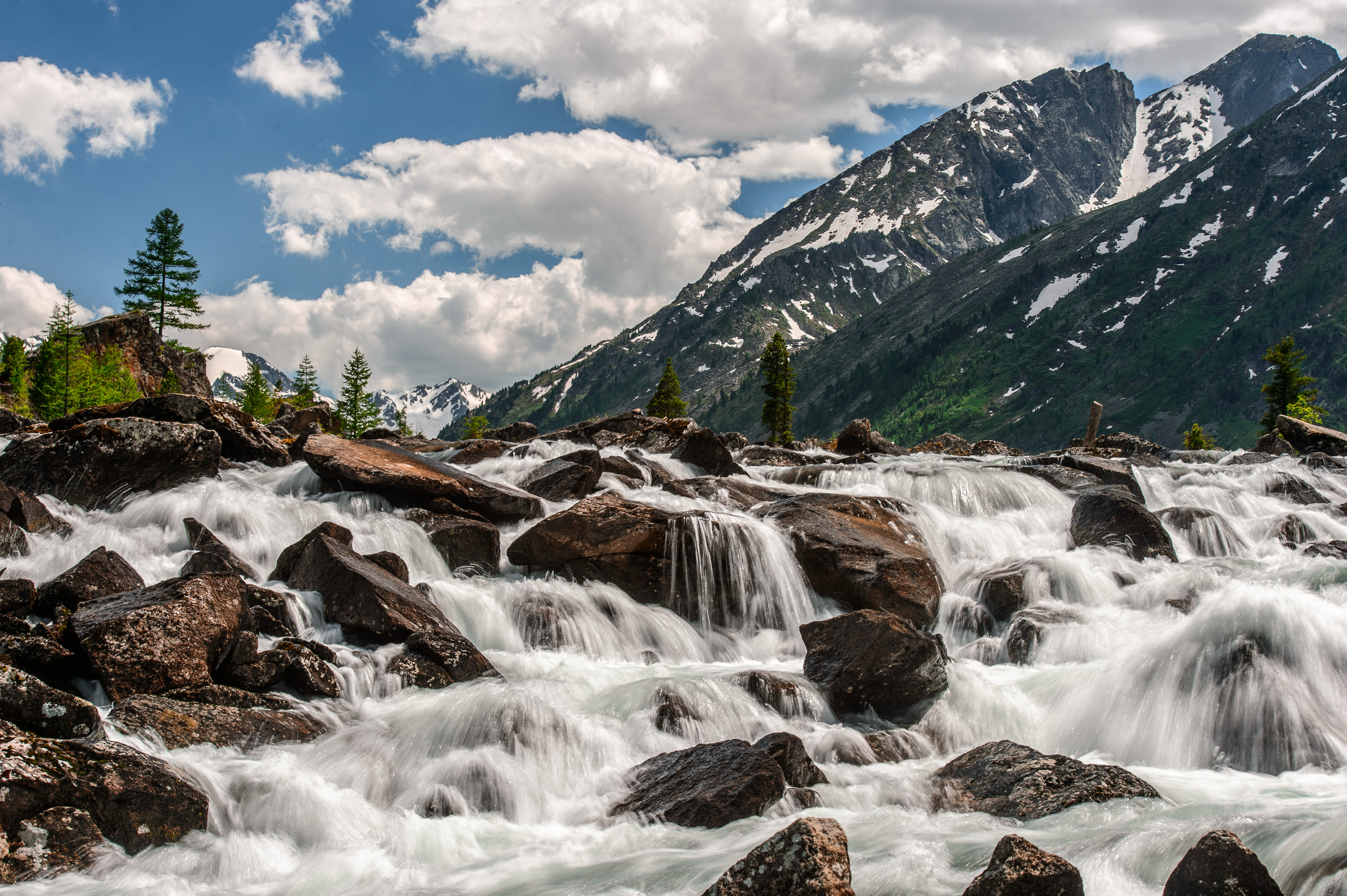 Мультинские озера: Северо-западный фланг Катунского хребта, в 7-10 км к северо-западу от высоты 3145., Мульта, Усть-Коксинский район, Алтай This image is related to the protected area of Russia number 0410044